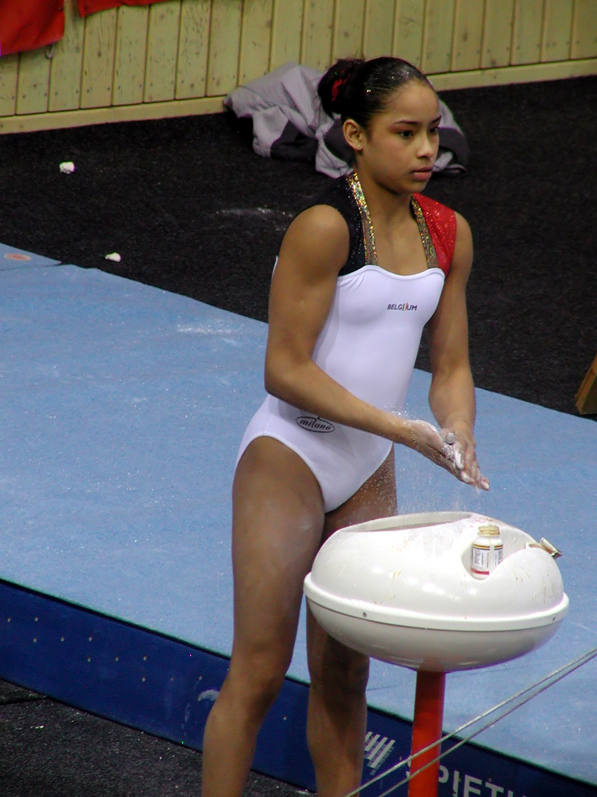 Aagje Vanwalleghem 2004 beim Turnier der Meister in Cottbus (Deutschland)